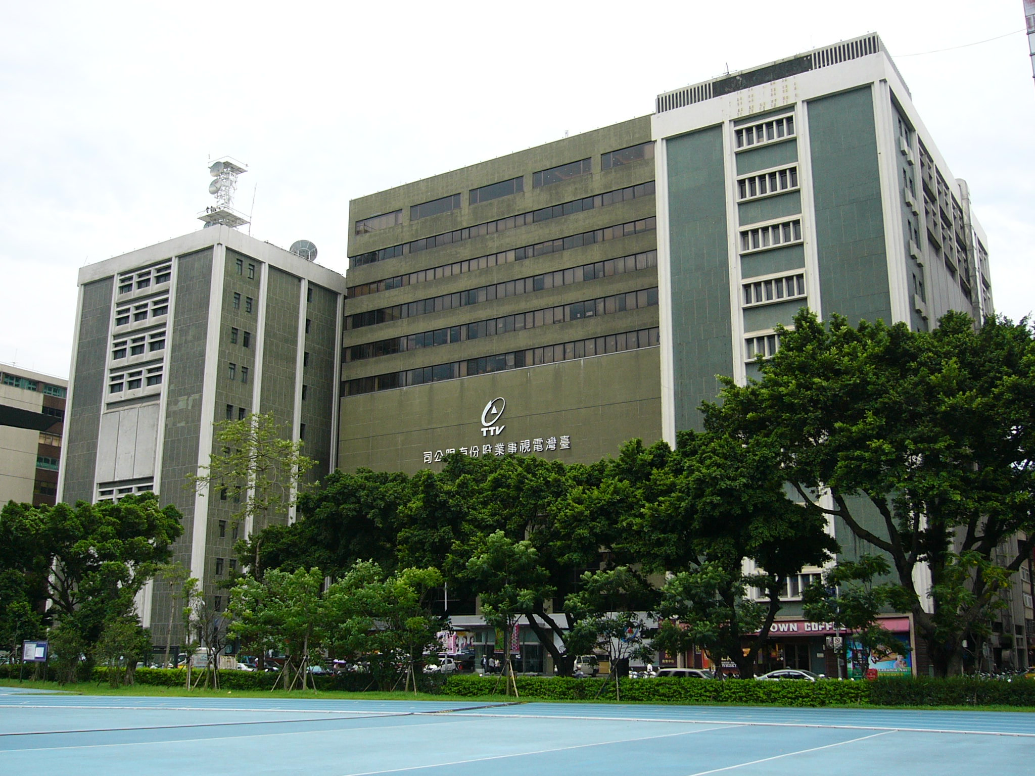 中文（台灣）: 從台北田徑場遠望台視大樓；左起：東翼大樓、中央大樓、西翼大樓。